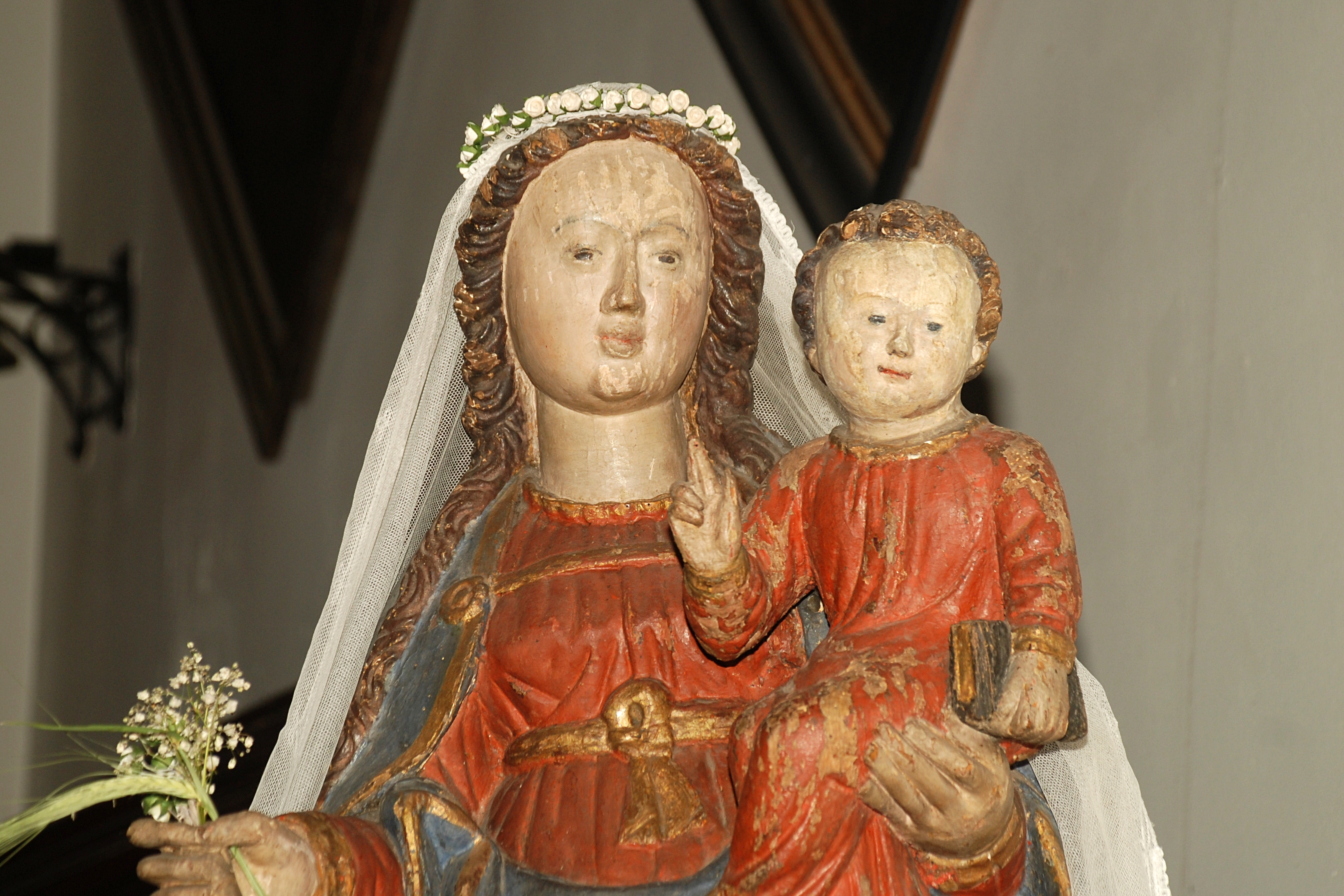 Belgique - Bousval - Notre-Dame du Try-au-Chêne